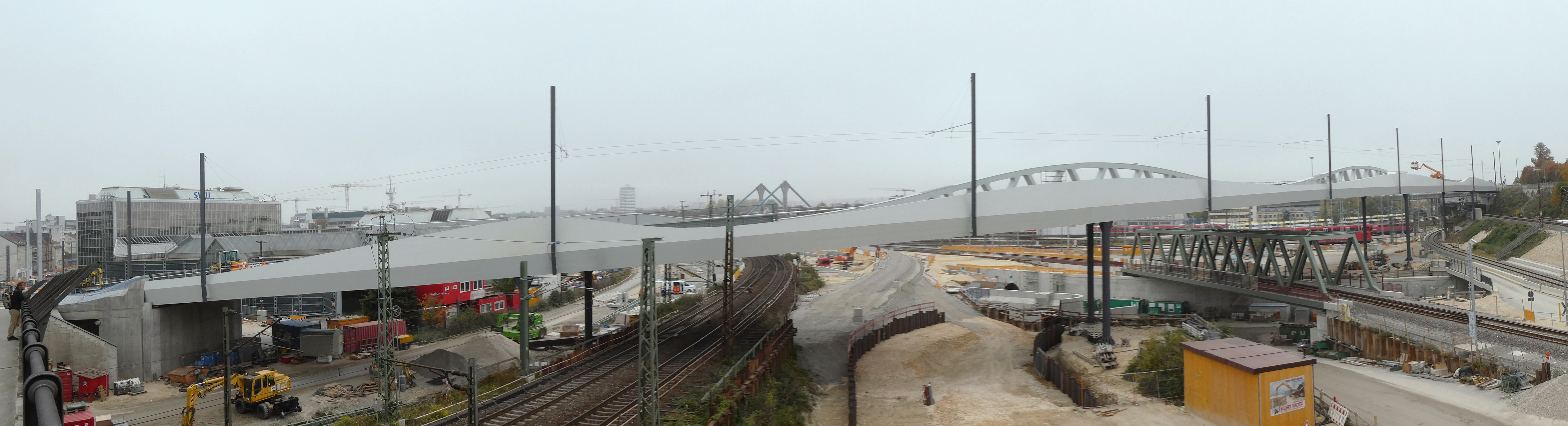 Ulm, Kienlesbergbrücke von Nordosten gesehen.